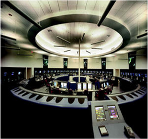 ACC - Centro de Controle de Área (Area Control Center) O ACC é o órgão responsável pelo controle de aeronaves niveladas (que estão mantendo o seu nível de cruzeiro), separação entre as aeronaves, etc.